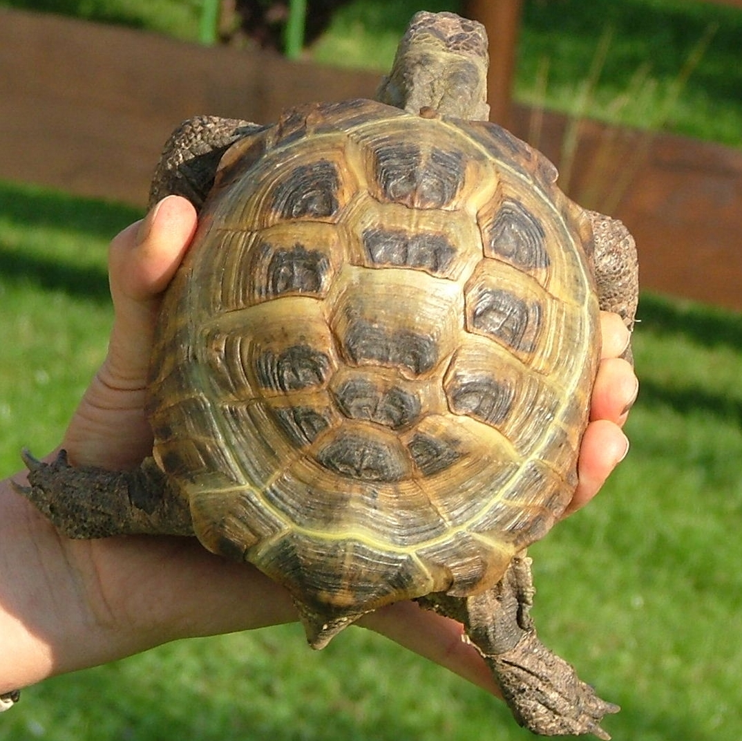 Ausschnittsvergrößerung des Bildes "Halden 001.jpg"